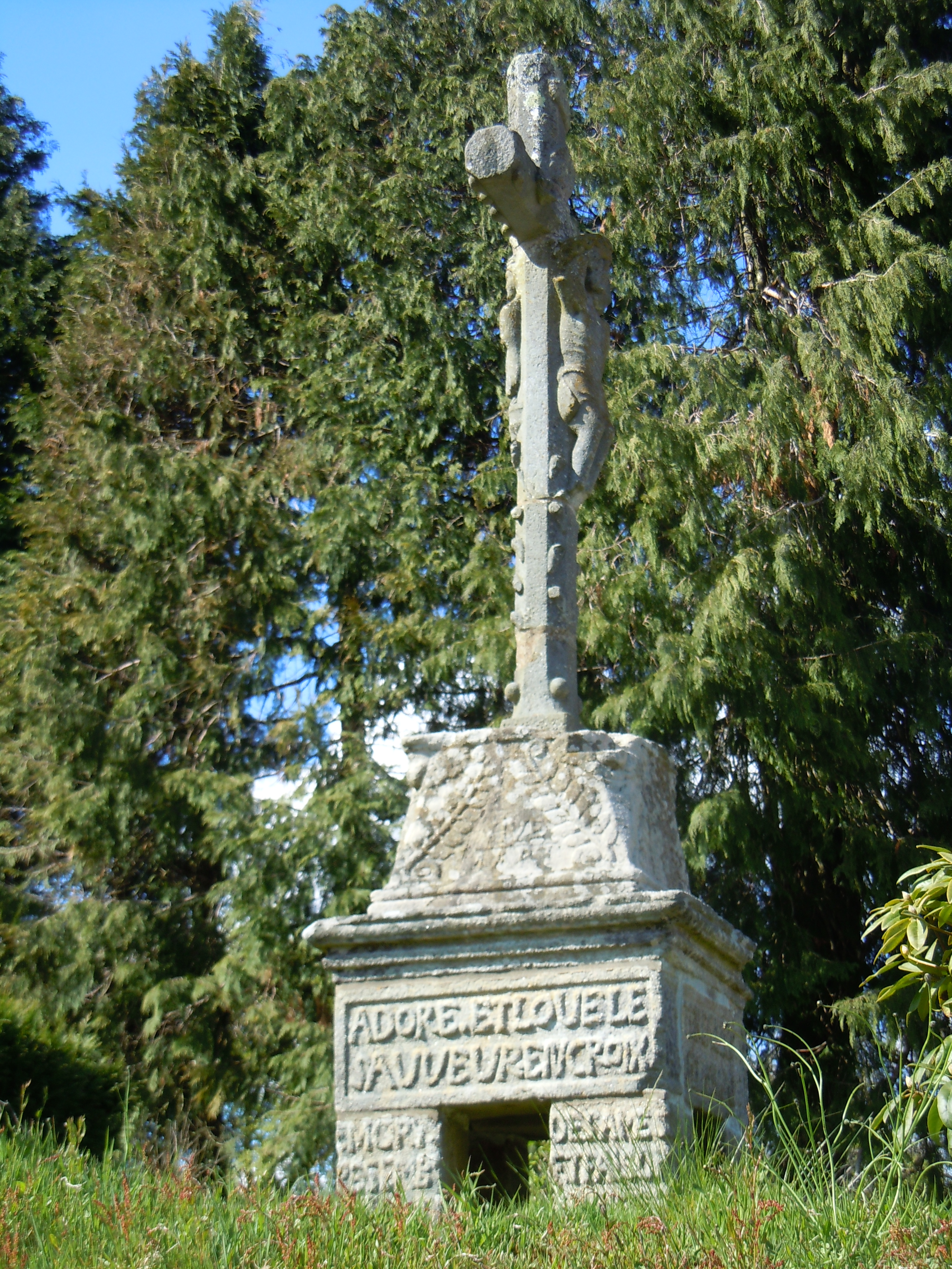 Croix érigée à l'entrée du village de Grellec à Ploërdut ( département du Morbihan)